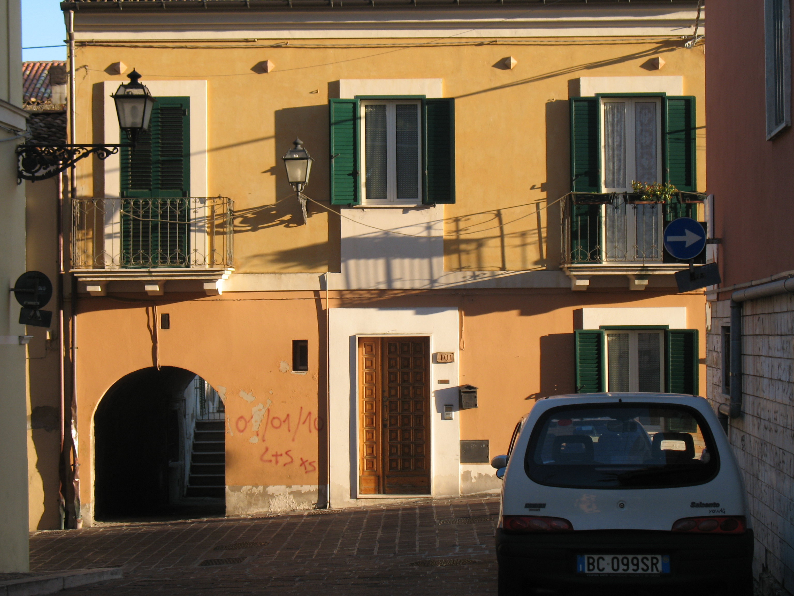 Casa con passaggio pedonale nel rione teatino della Civitella